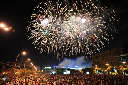 Фейерверк на площади Свободы